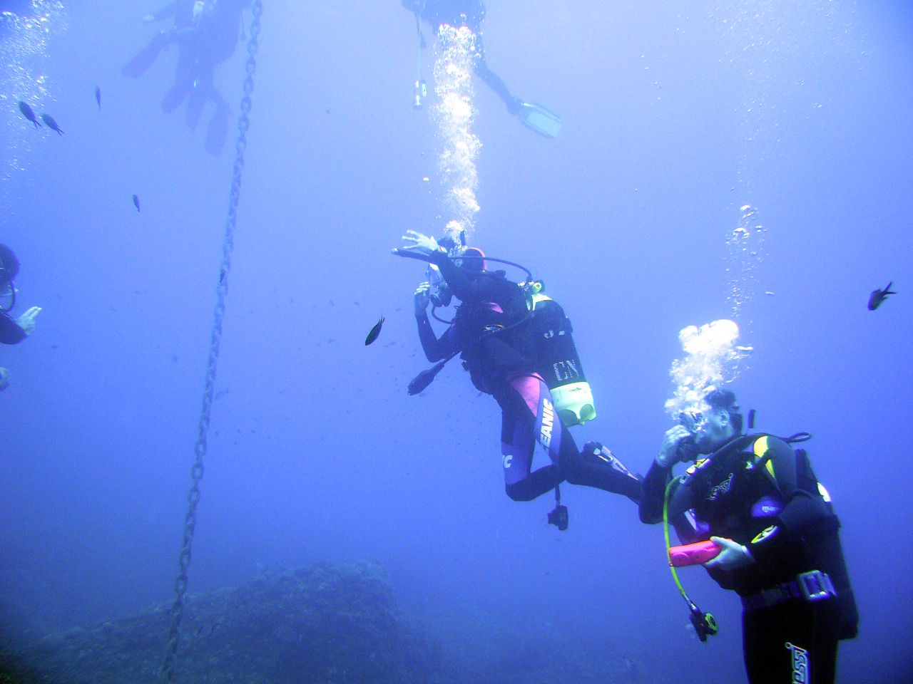 Portofino diving.